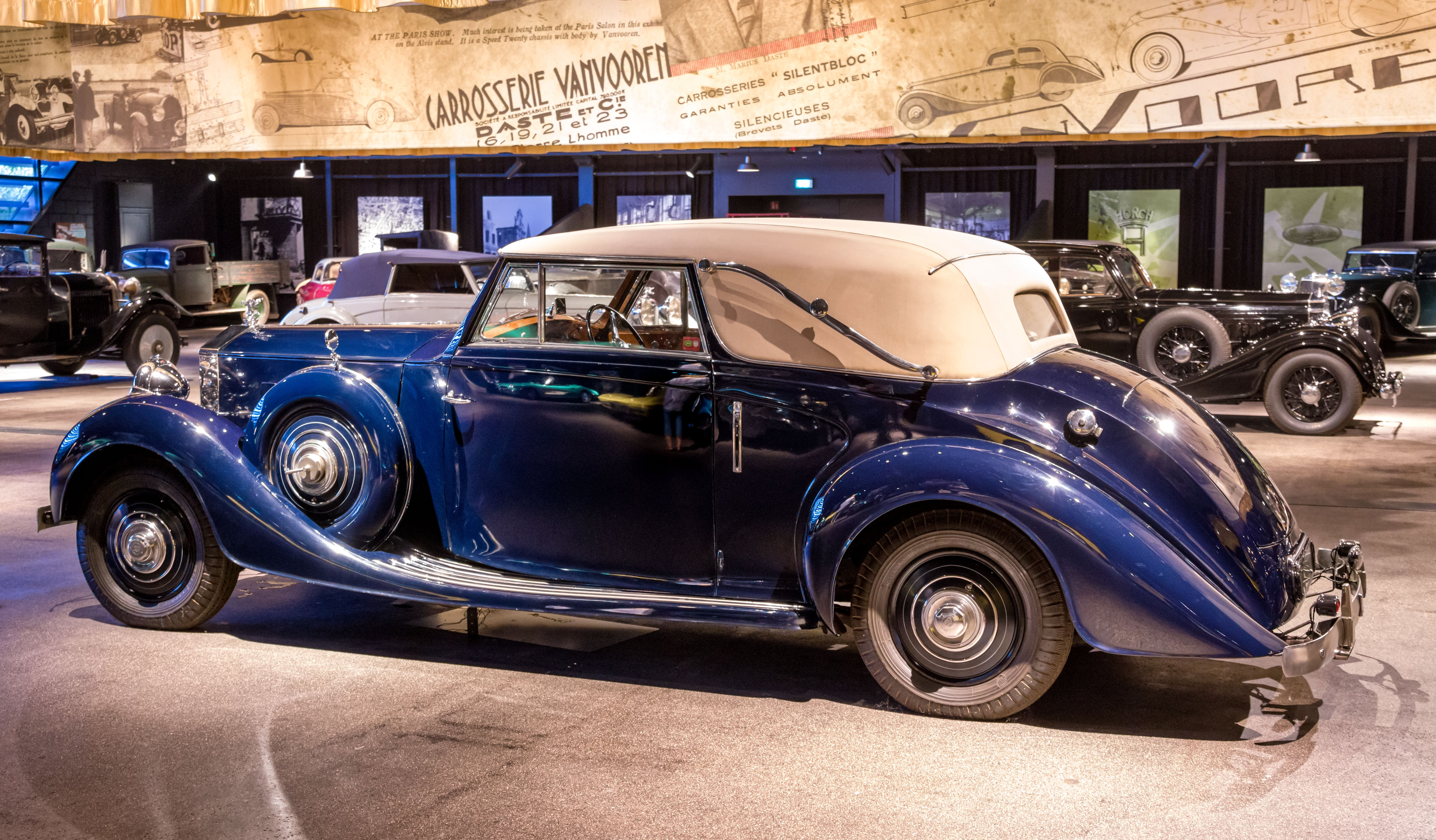 Das Volante Oldtimermuseum in Kirchzarten